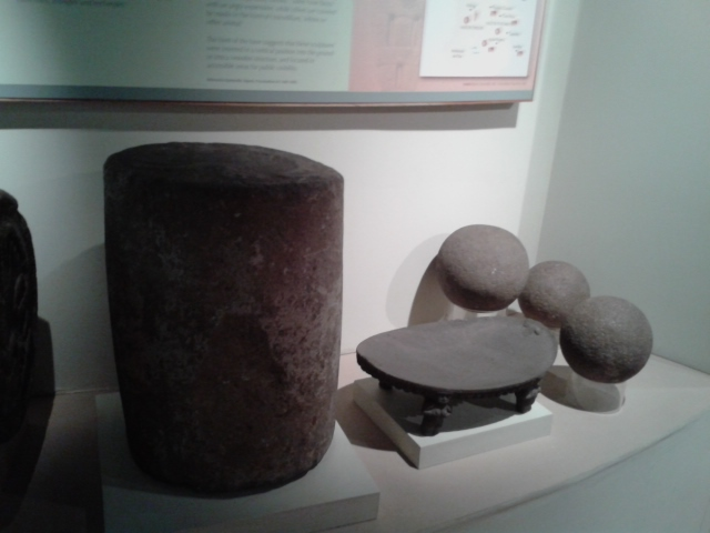 Artefactos de piedra de la cultura de Diquís (Costa Rica): barril, metate y esferas de piedra.